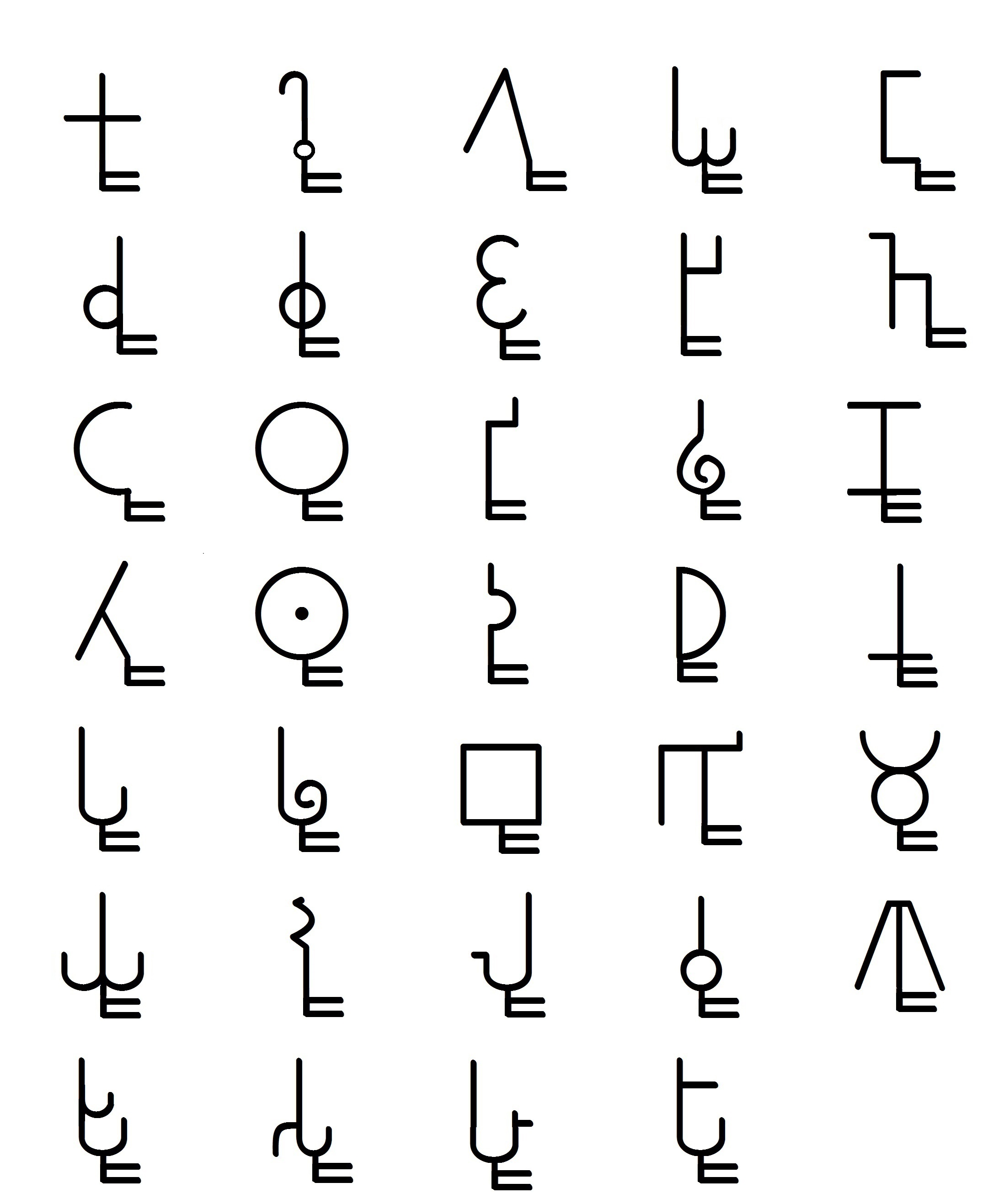 ब्राम्हि लिपी ऊ-कार